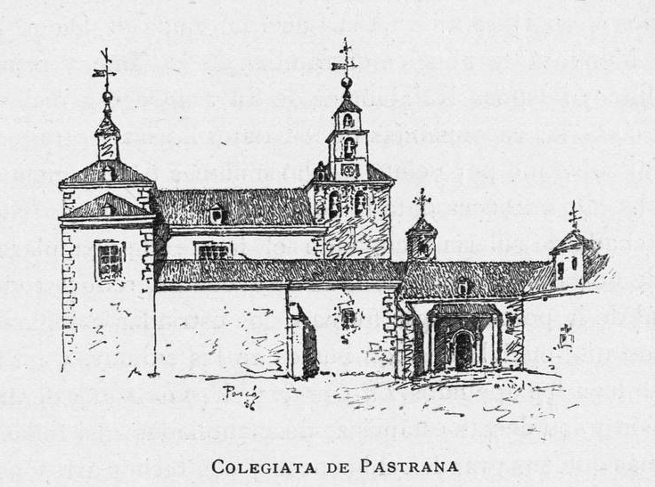 Colegiata de Pastrana.